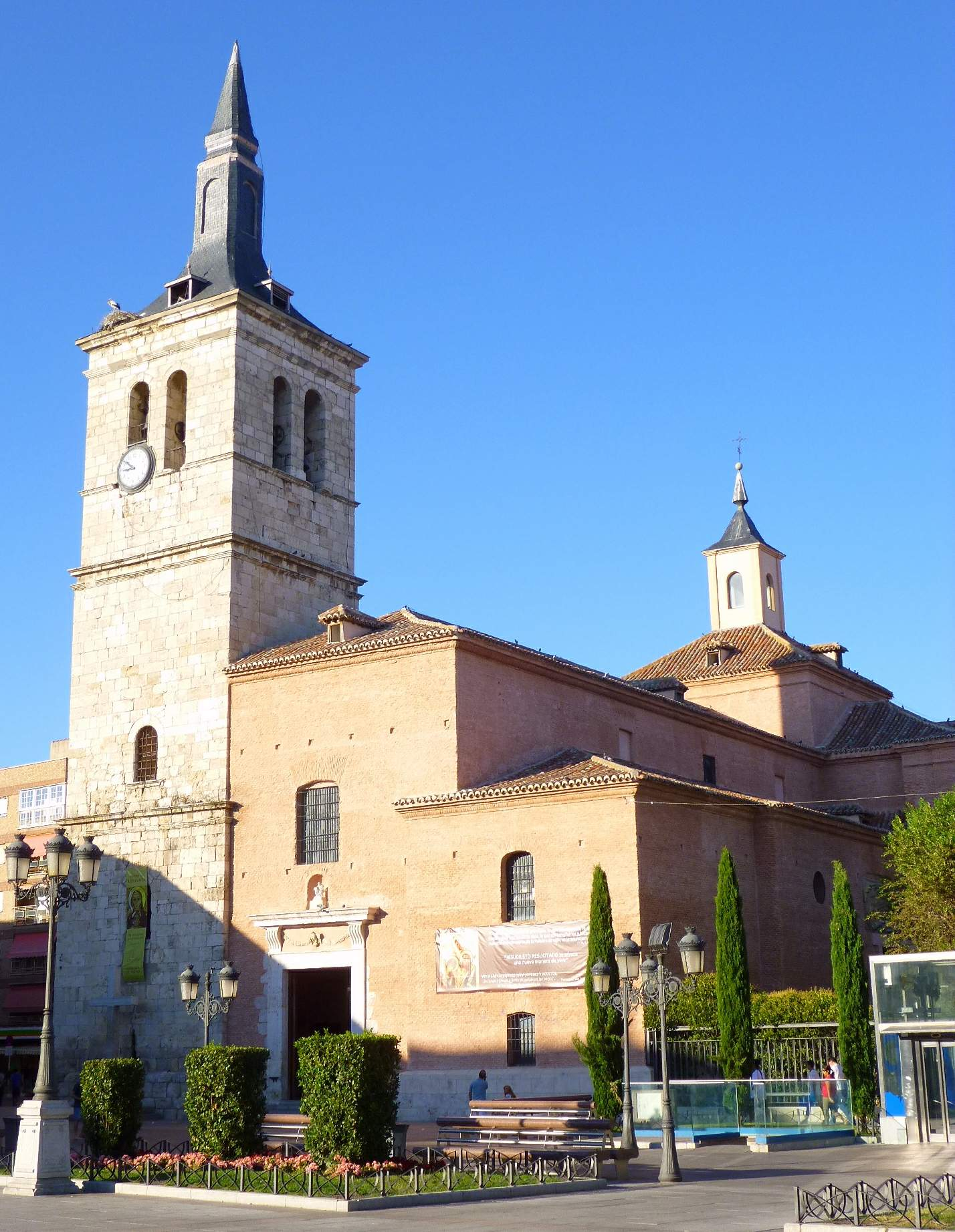 Iglesia de San Juan Evangelista (Torrejón de Ardoz)